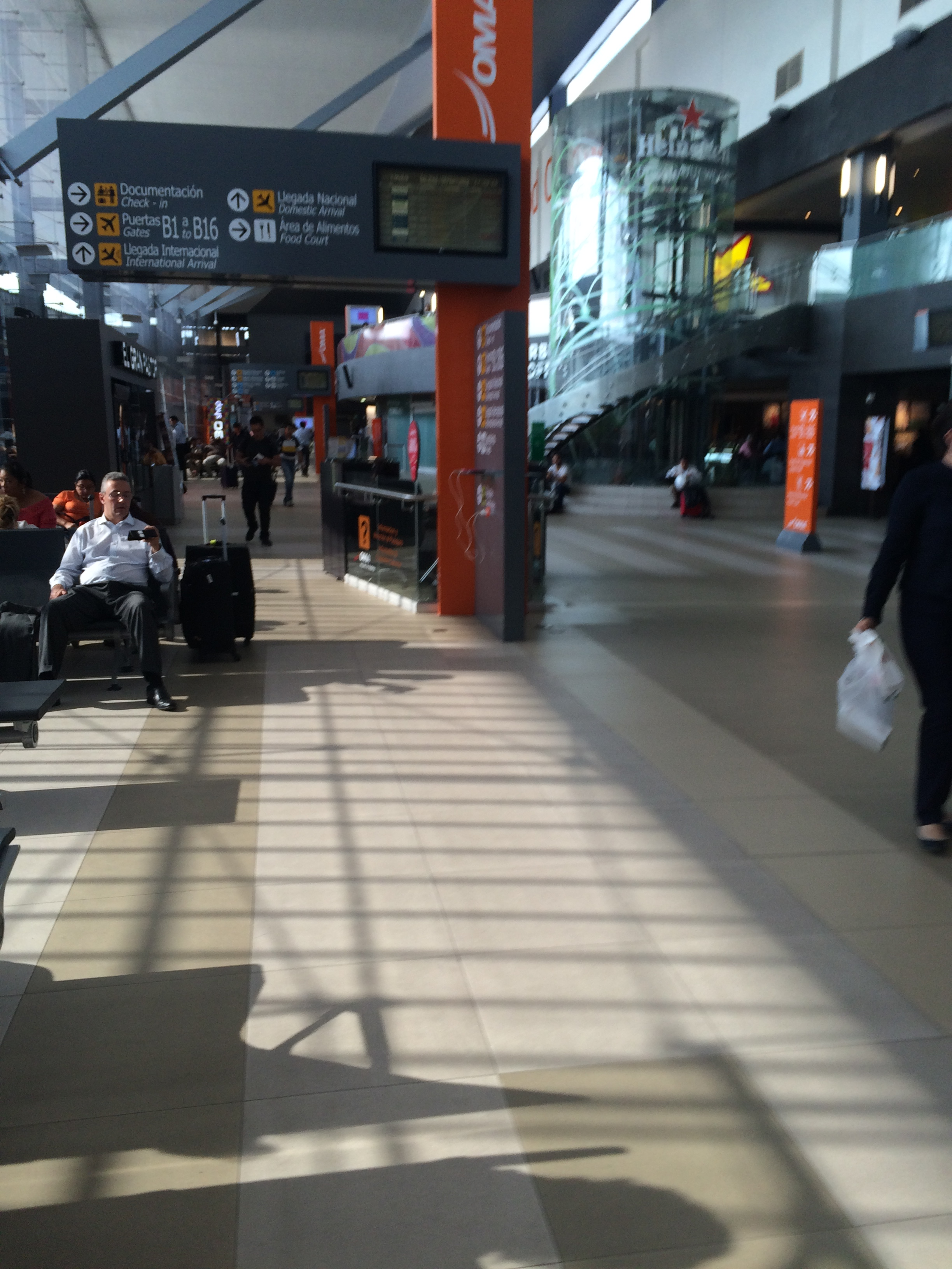 Pasillo principal de la Terminal B del Aeropuerto Internacional de Monterrey.